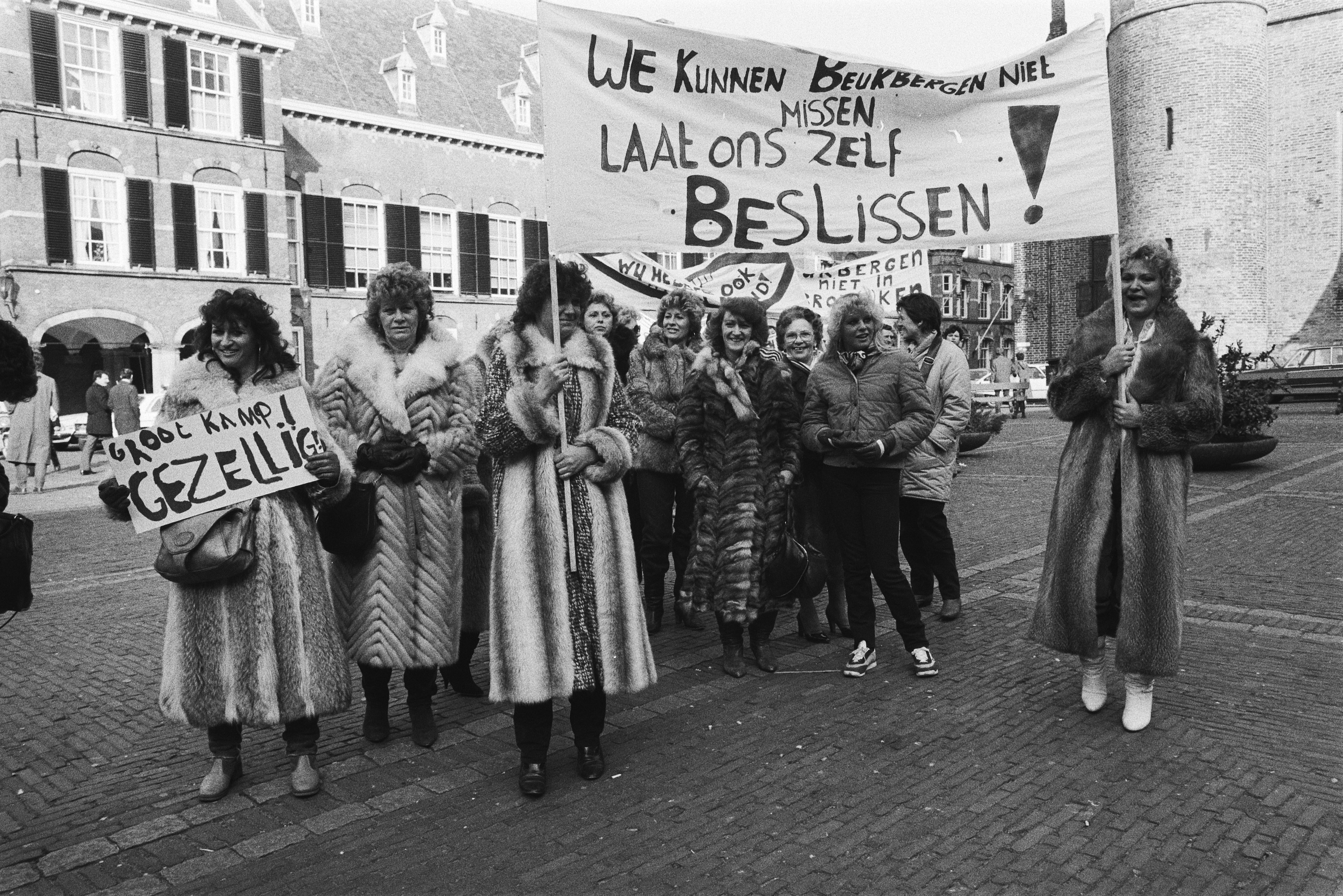 Collectie / Archief : Fotocollectie Anefo Reportage / Serie : Woonwagenbewoonsters uit centrum Beukbergen in Zeist demonstreren op het Binnenhof tegen vermindering van het aantal standplaatsen Beschrijving : Vrouwen met spandoek "We kunnen Beukbergen niet missen, laat ons zelf beslissen" Datum : 15 februari 1983 Locatie : Den Haag, Zuid-Holland Trefwoorden : betogingen, minderhedenbeleid, woonwagenkampen Fotograaf : Croes, Rob C. / Anefo Auteursrechthebbende : Nationaal Archief Materiaalsoort : Negatief (zwart/wit) Nummer archiefinventaris : bekijk toegang 2.24.01.05 Bestanddeelnummer : 932-5017